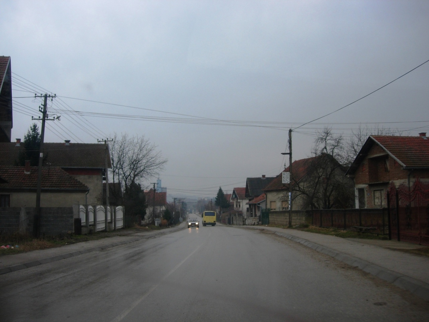 Bojnik